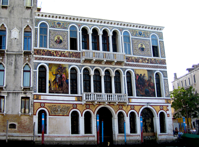 Palazzo Barbarigo a Venezia Licensing Categoria:Immagini esclusivamente in GNU FDL